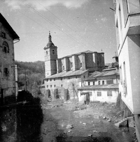 Lazcano (Guipuzcua). Paisaje con la Iglesia Parroquial al fondo